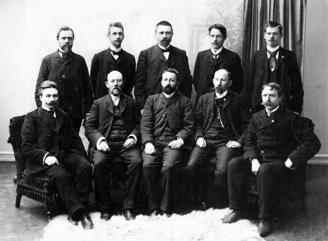 Arbeiderpartiets stortingsgruppe 1906 - 1909 Sittende fra venstre: Isak Saba, Christian Holtermann Knudsen, Alfred Eriksen, Anders Buen, Adam Egede-Nissen. Stående fra venstre: John Lind Johansen, Magnus Nilssen, Torgeir Vraa, Meyer Foshaug og Lars Sæbø